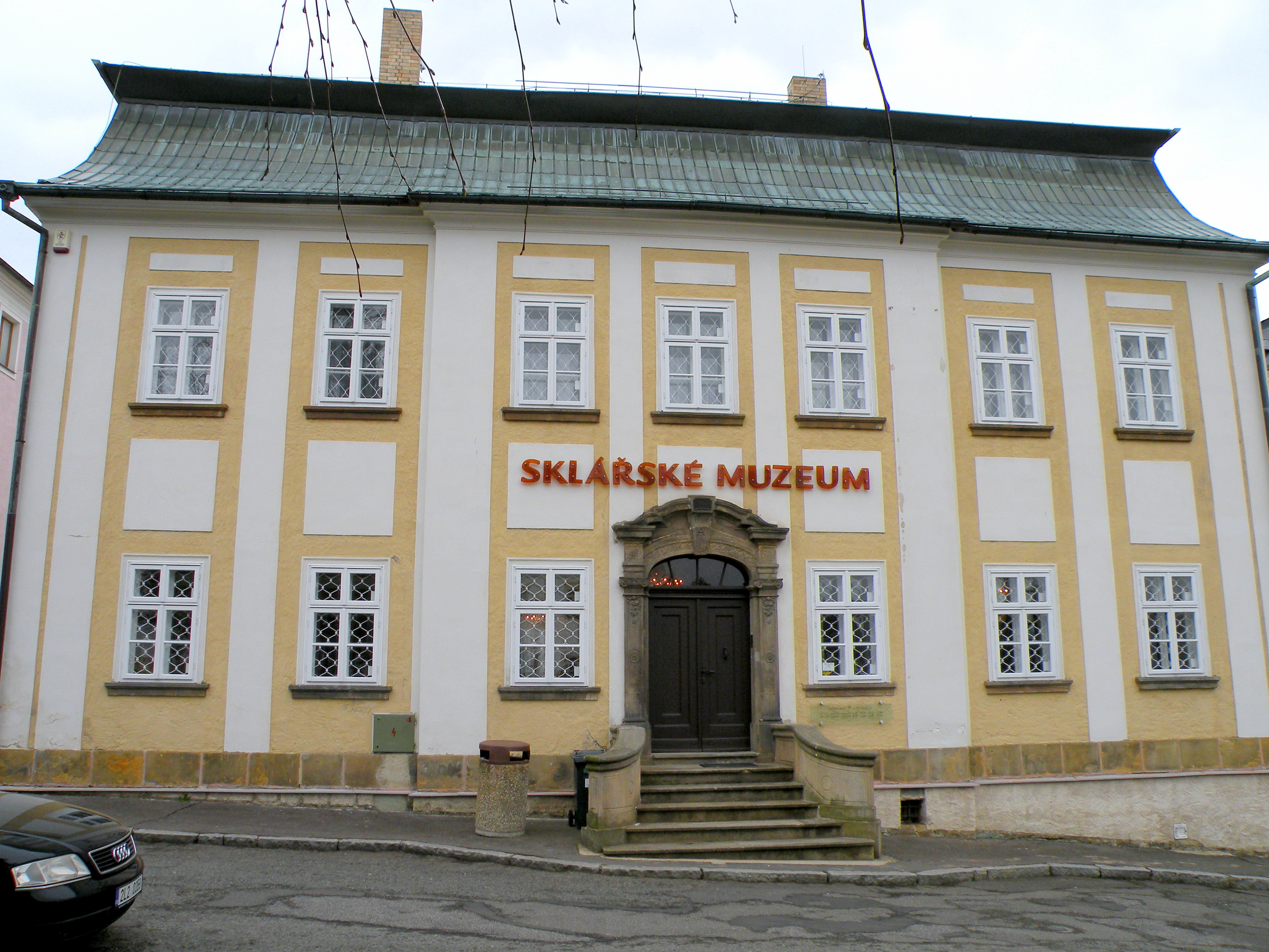 Novy Bor glasmuseum